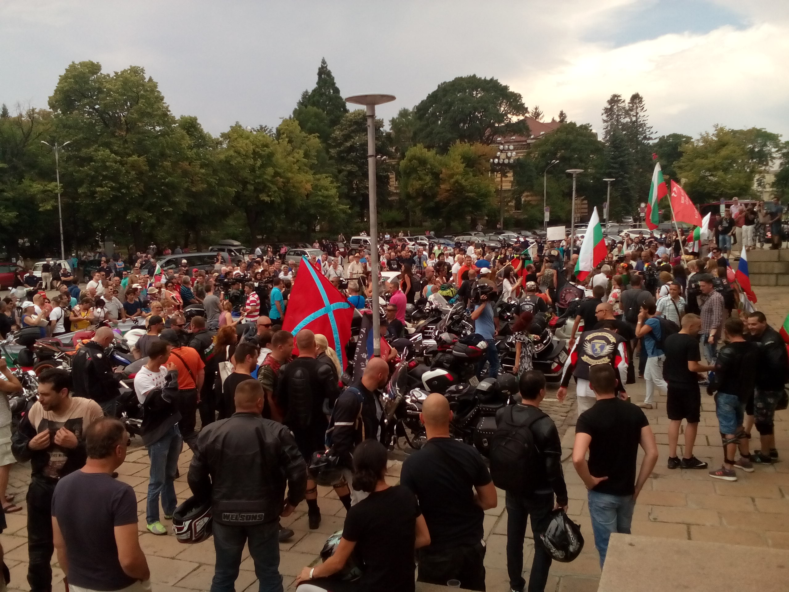 Посрещане на рокерите от руския клуб "Нощни вълци" пред катедралата "Св. Александър Невски" в София.